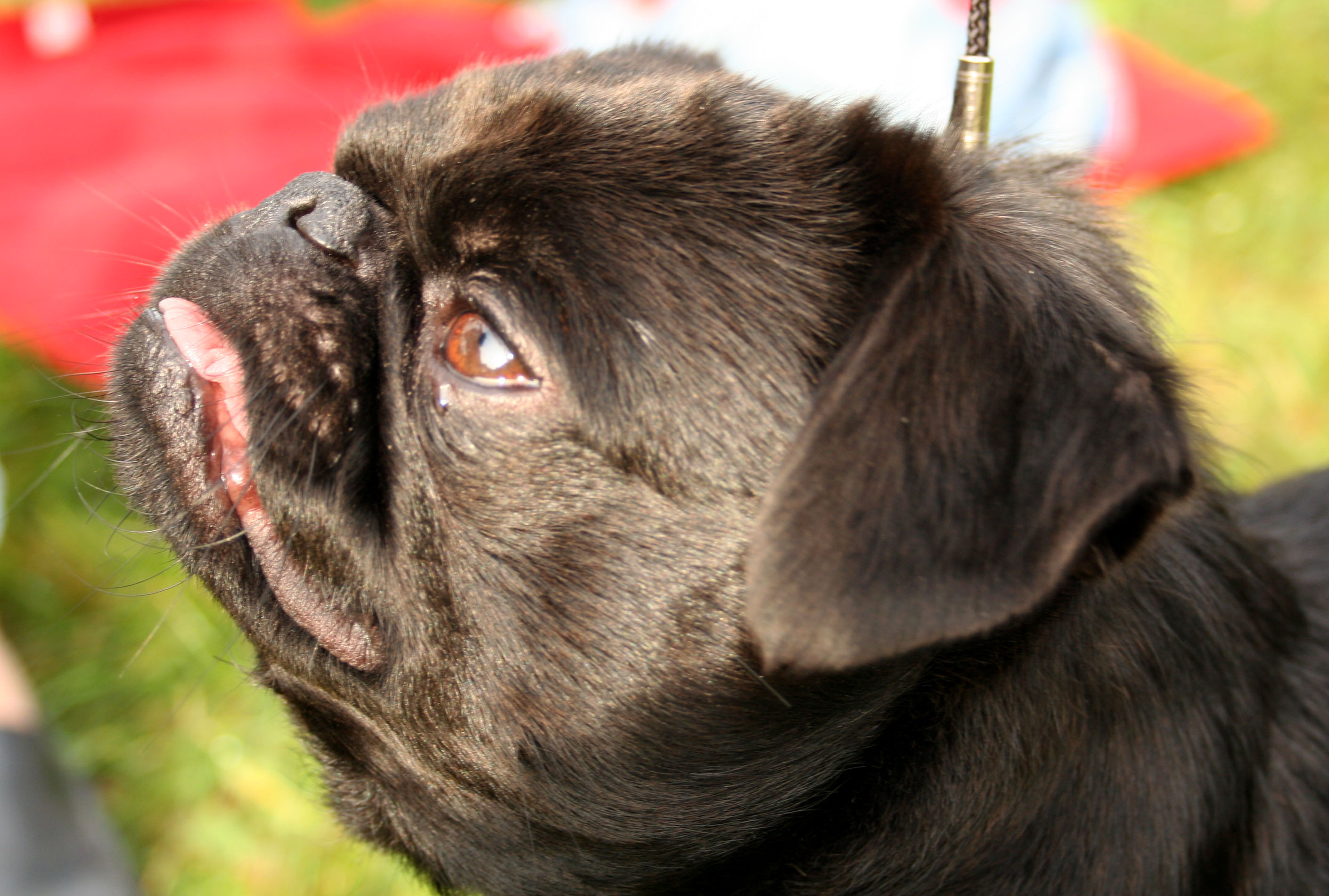 Brabantczyk